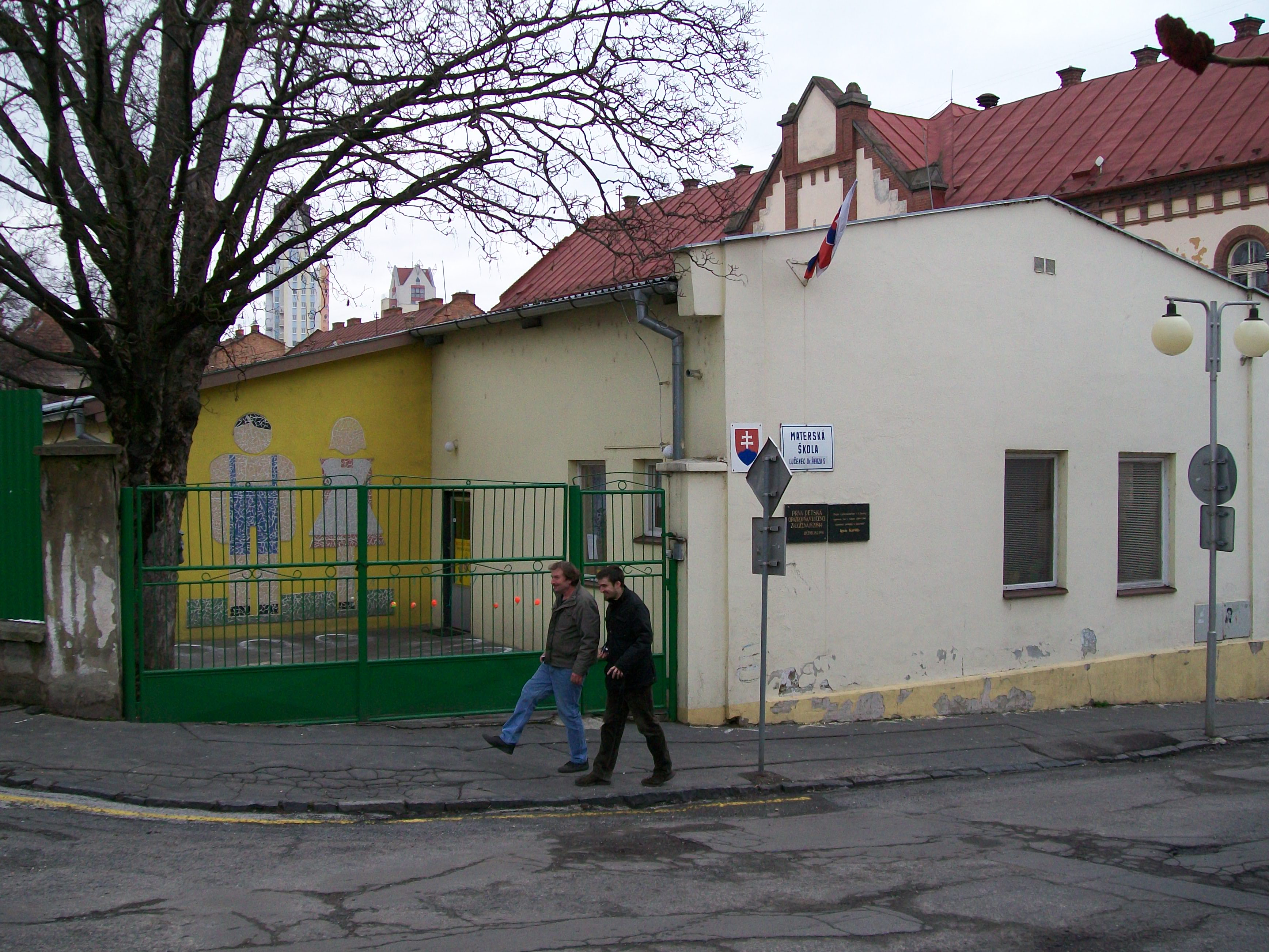 Prvá detská opatrovňa v Lučenci založená v roku 1844, prvým vychovávateľom v I. Detskej opatrovni bol v rokoch 1844 - 1846 významný pedagóg a spisovateľ Ignác Karády.